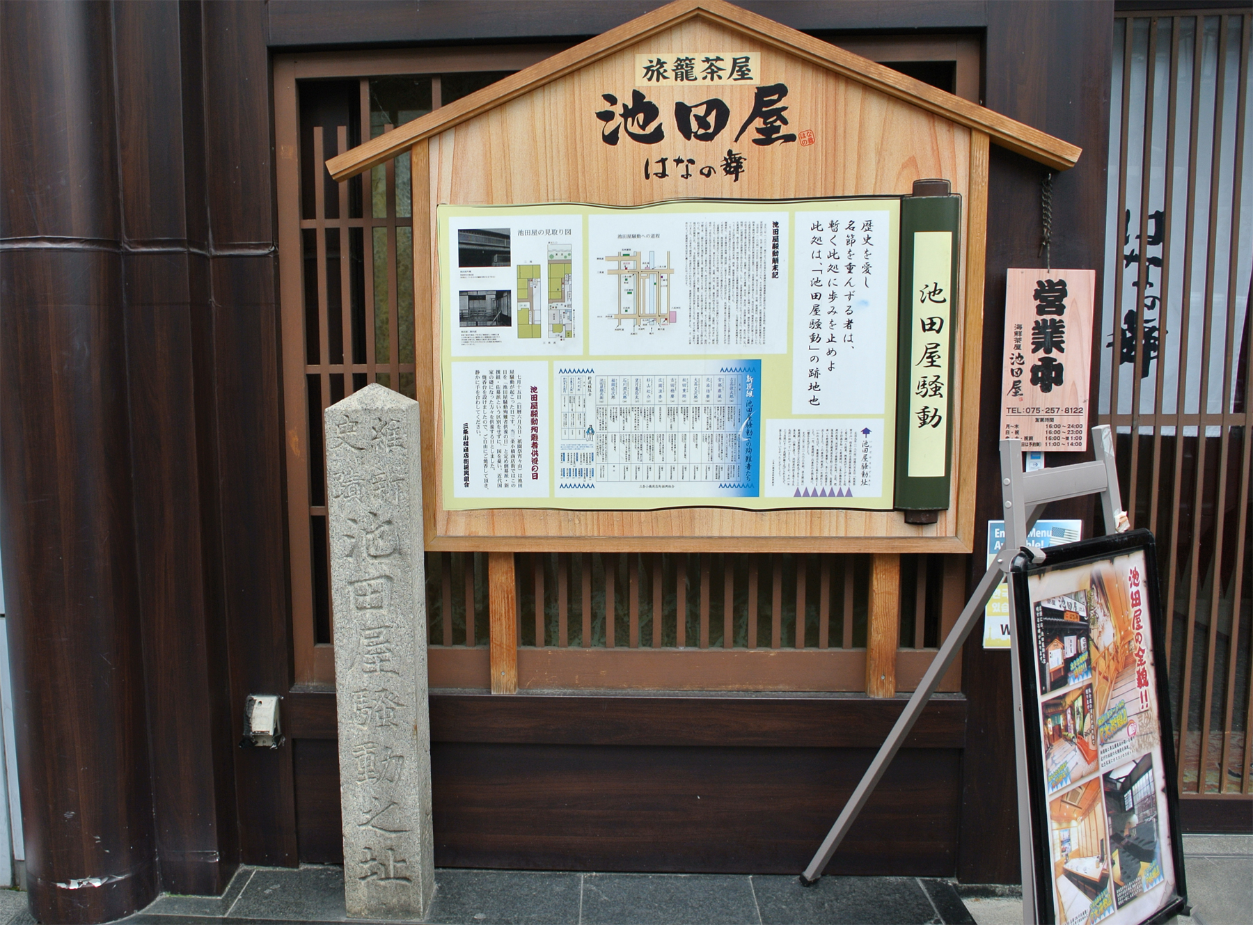 池田屋事件・現在の池田屋跡